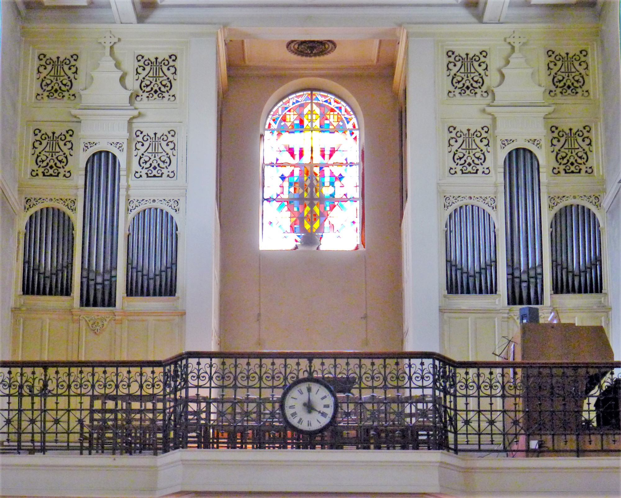 Église Notre-Dame-de-Grâce-de-Passy (orgue de tribune) - Paris XVI